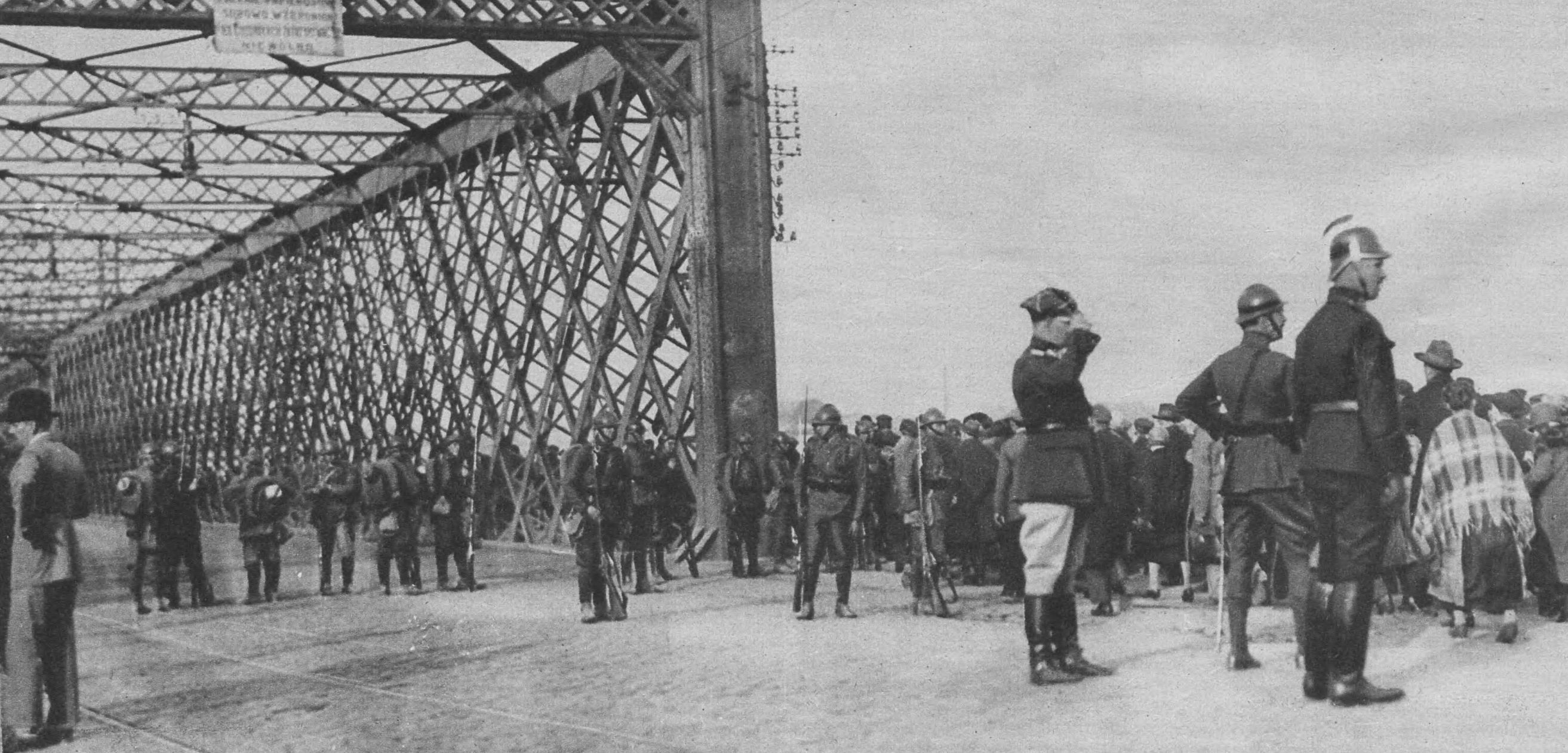 Most Kierbedzia w Warszawie, obsadzany przez 10 pułk piechoty podczas zamachu majowego 1926 roku.